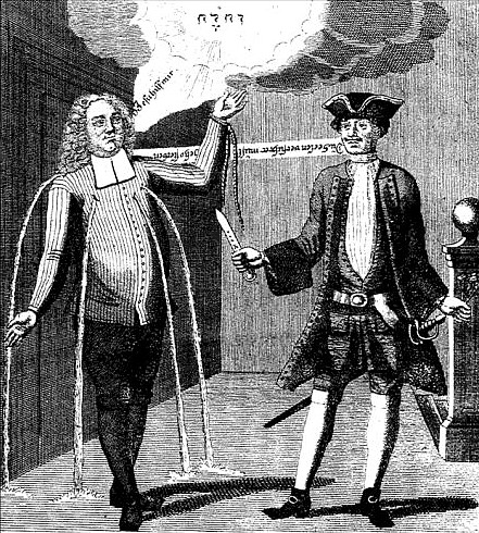 Stich, der die Ermordung Hermann Joachim Hahns durch Frantz Laubler zeigt